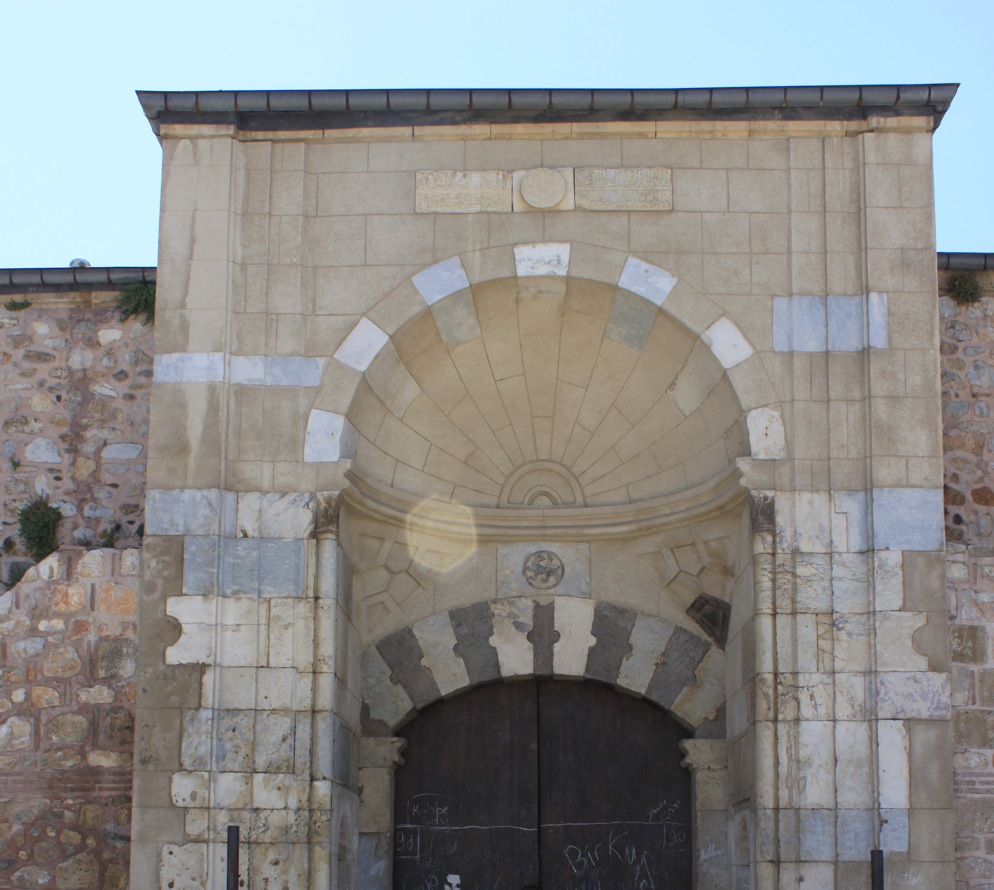 Eingang des Hans mit dem ungewöhnlichen Fächer und dem Löwensiegel über dem Schlussstein.